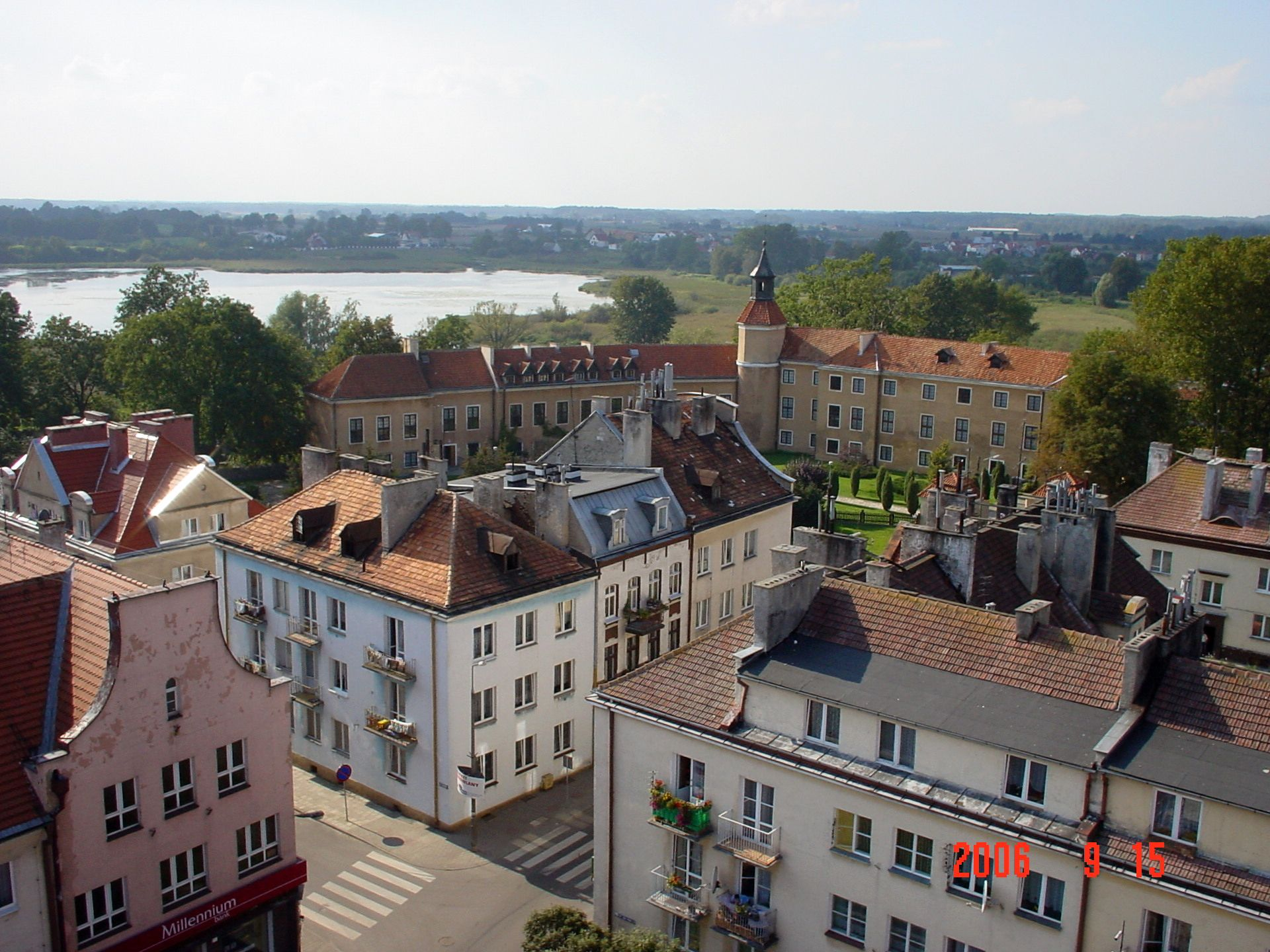 Pałac Dohnów, widok z wieży ratusza